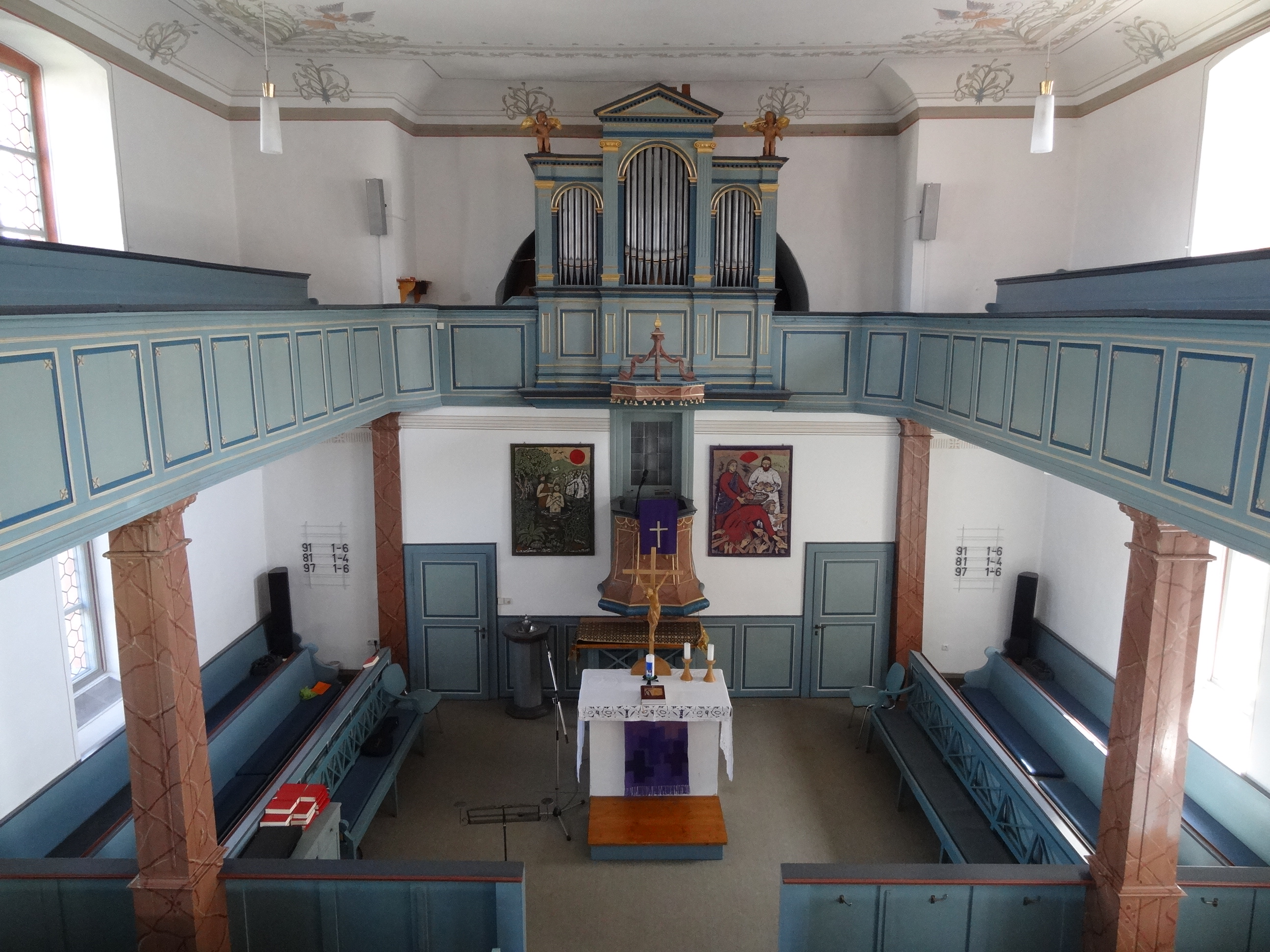 Ev. Kirche Rödgen (Gießen)